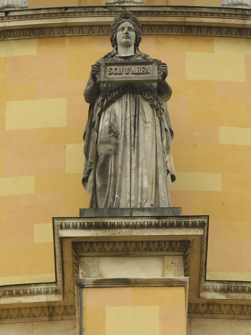 Diese Statue an der Aussenseite der Befreiungshalle in Kelheim steht für den Volksstamm aus Schwaben, Höhe der Statue 580 cm. Sie ist eine von 18 Statuen, die nach Modellen des Bildhauers Johann Halbig geschaffen wurden